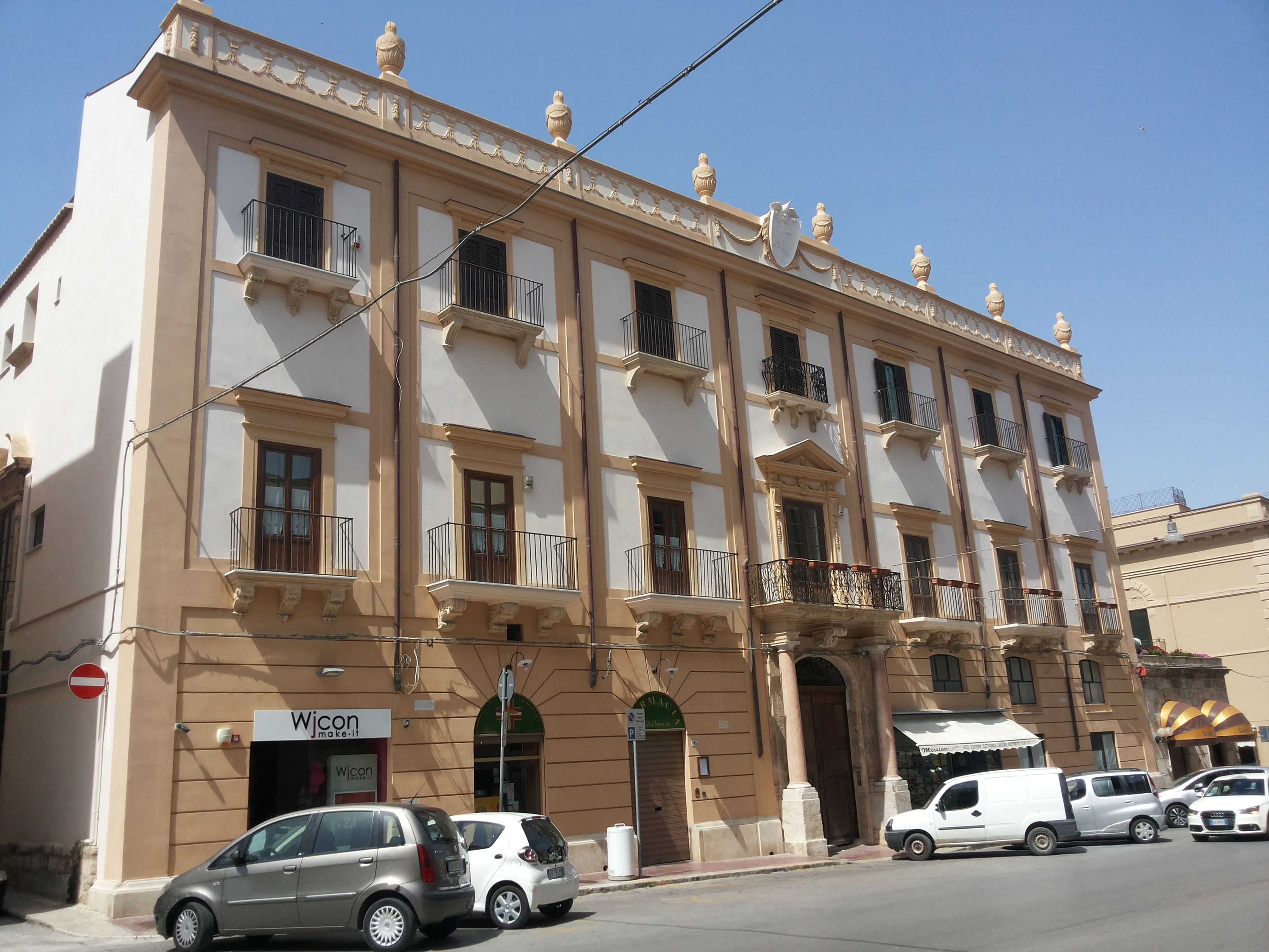 Palazzo Pastore, Alcamo